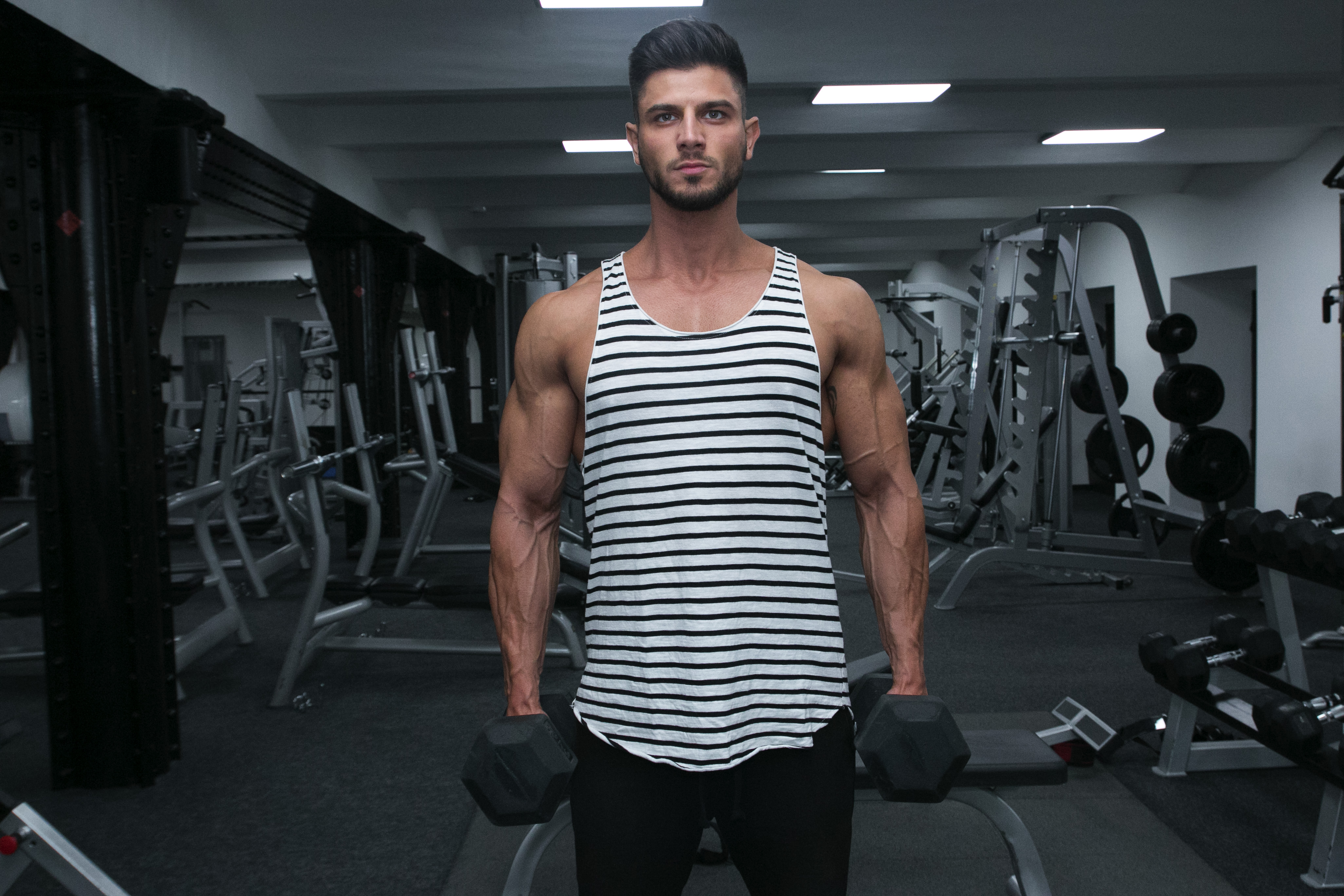 fotózás